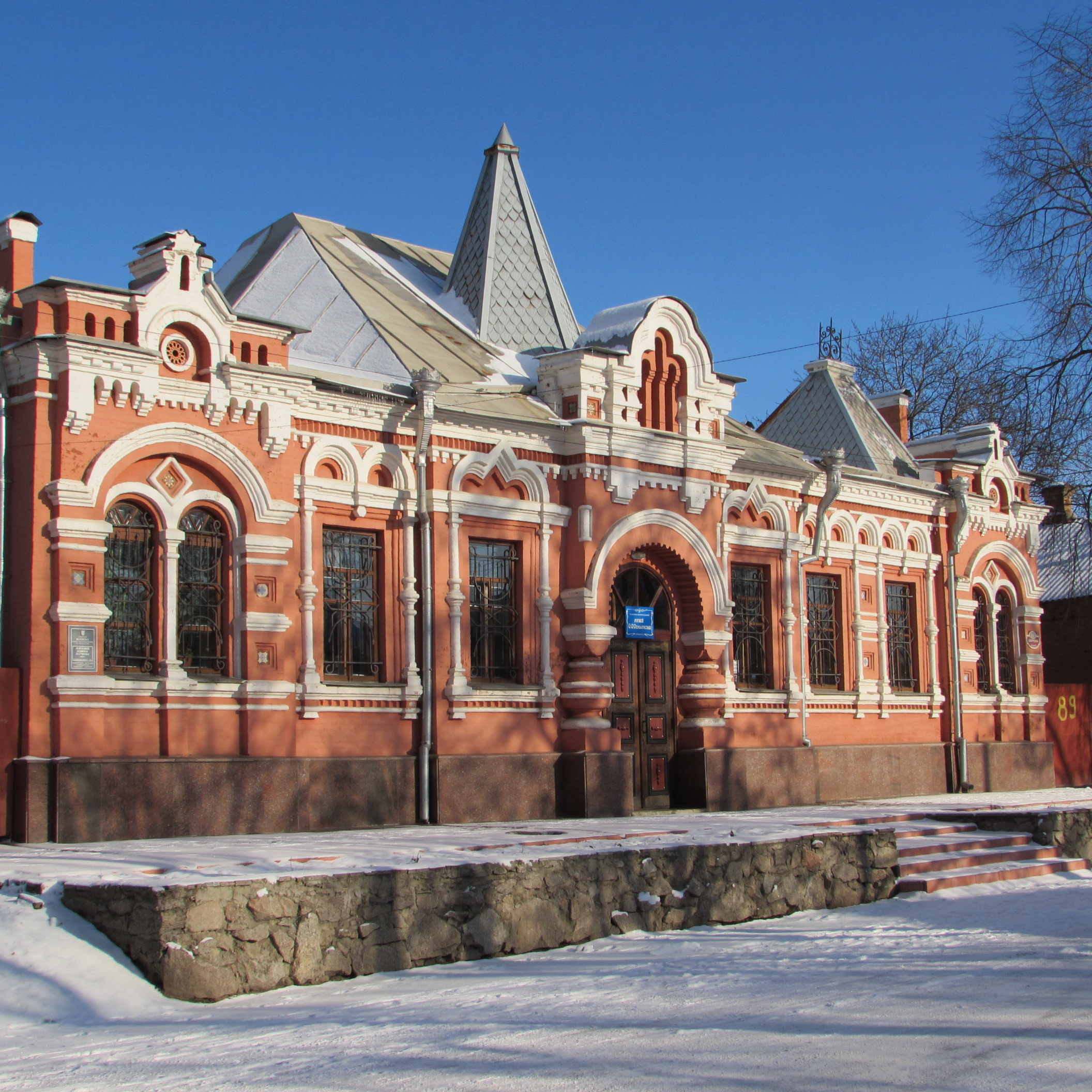 Будинок Я. В. Паученка, в якому жив художник О. О. Осмьоркін, Кропивницький, вул. А. Паученка (Дворцова), 89